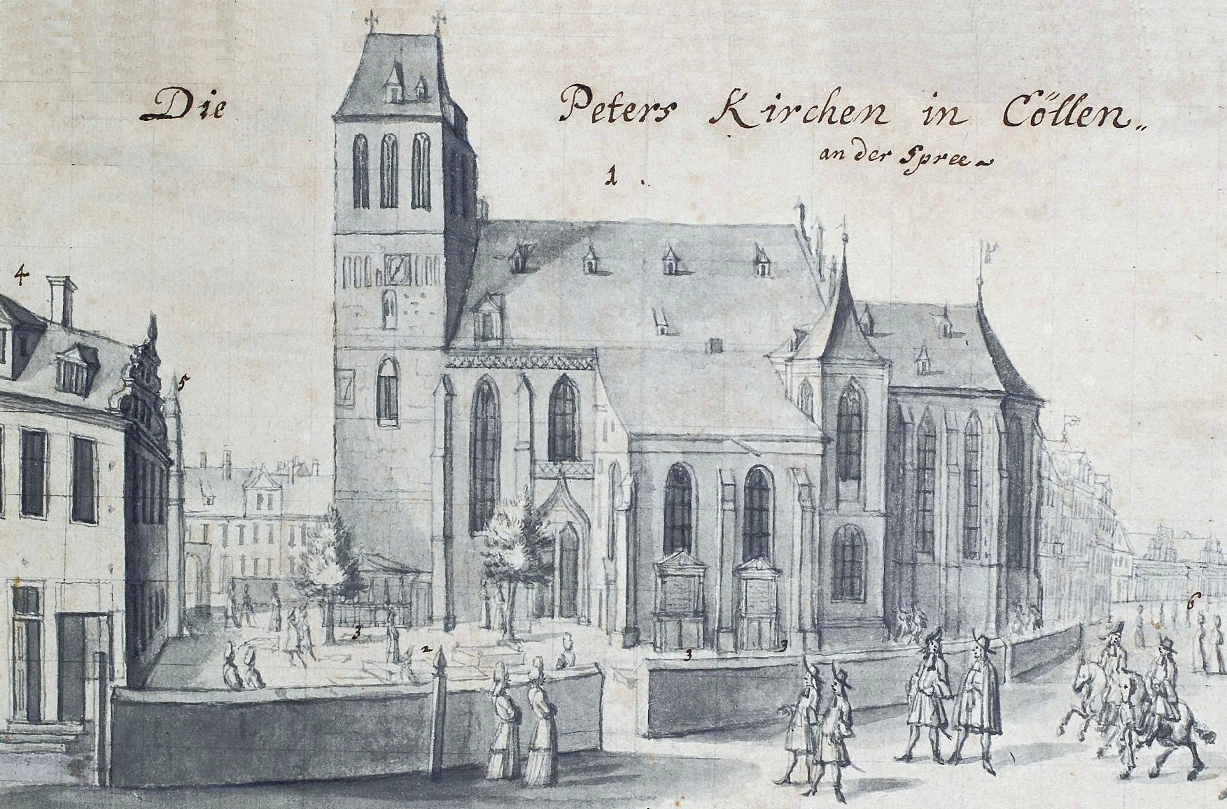 Berlin-Cölln, lutherische Pfarrkirche St. Petri um 1690